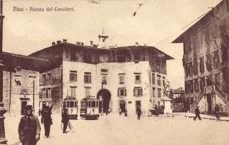 Incrocio tranviario in piazza dei Cavalieri